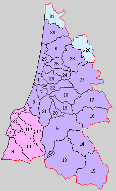 秋田県由利郡の町村。